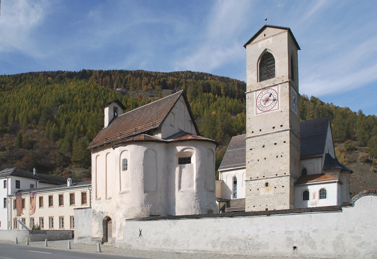 Benediktinerkloster St. Johann im Val Müstair